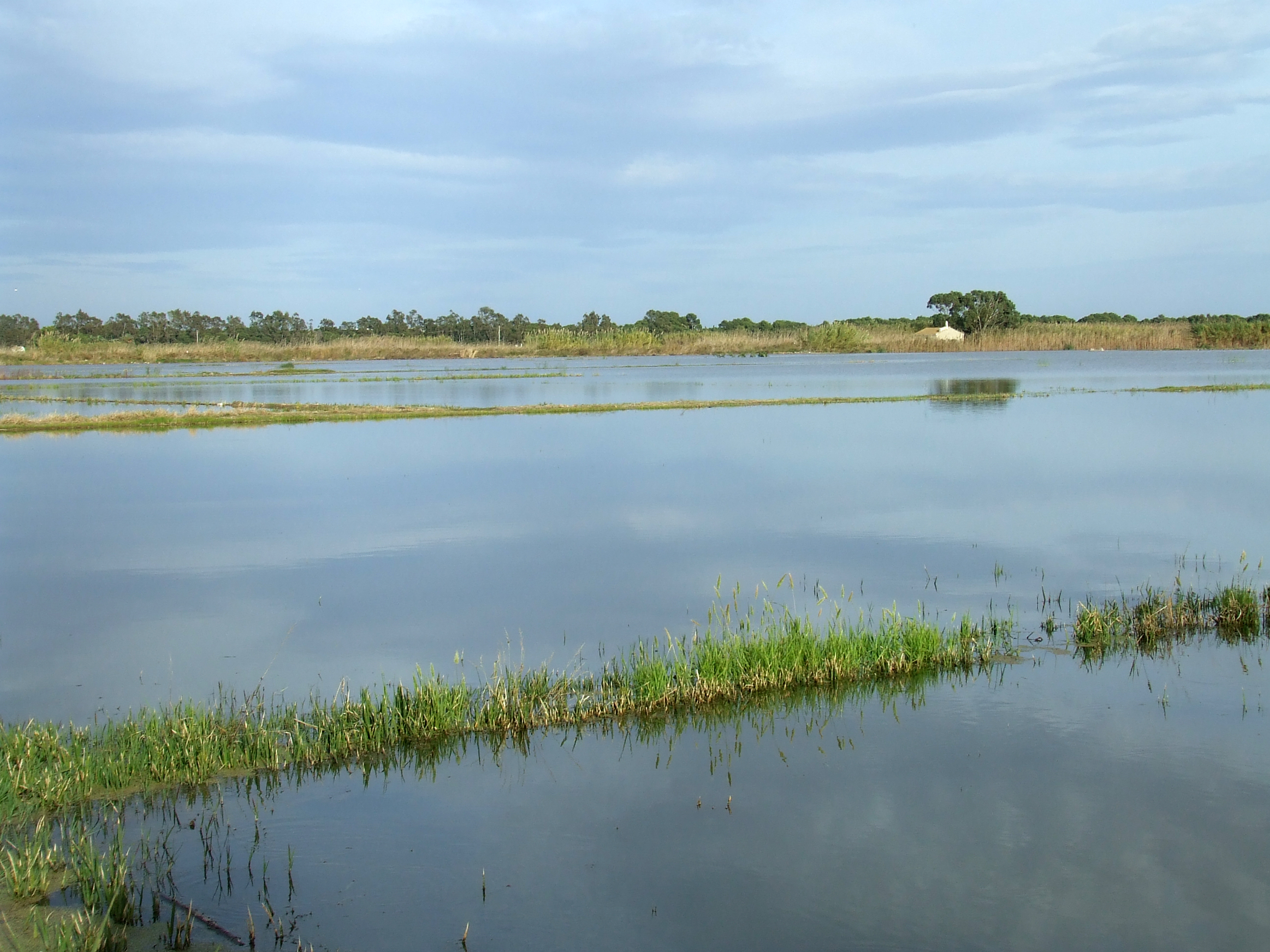 Sense arròs no hi ha paella. Espills en la terra, camps de sol i núvols, l’Albufera nodreix amb les seues aigües els nostres camps i d'ells ens nodrim amb les seues riqueses. Però ací no acaba el cicle, la nostra petjada no pot obviar-se. També nosaltres hem de nodrir l'albufera amb esforç i cura, protegir-la, netejar-la i donar-li vida. Així, tancant el cercle, retroalimentant-lo positivament, podrem gaudir durant generacions de la nostra horta neta i, com no, de la paelleta dels diumenges. Perquè sense Albufera no hi ha arròs, i sense arròs no hi ha paella. Imatge presentada al concurs fotogràfic Horta Net@ 2013 organitzat per la Xarxa